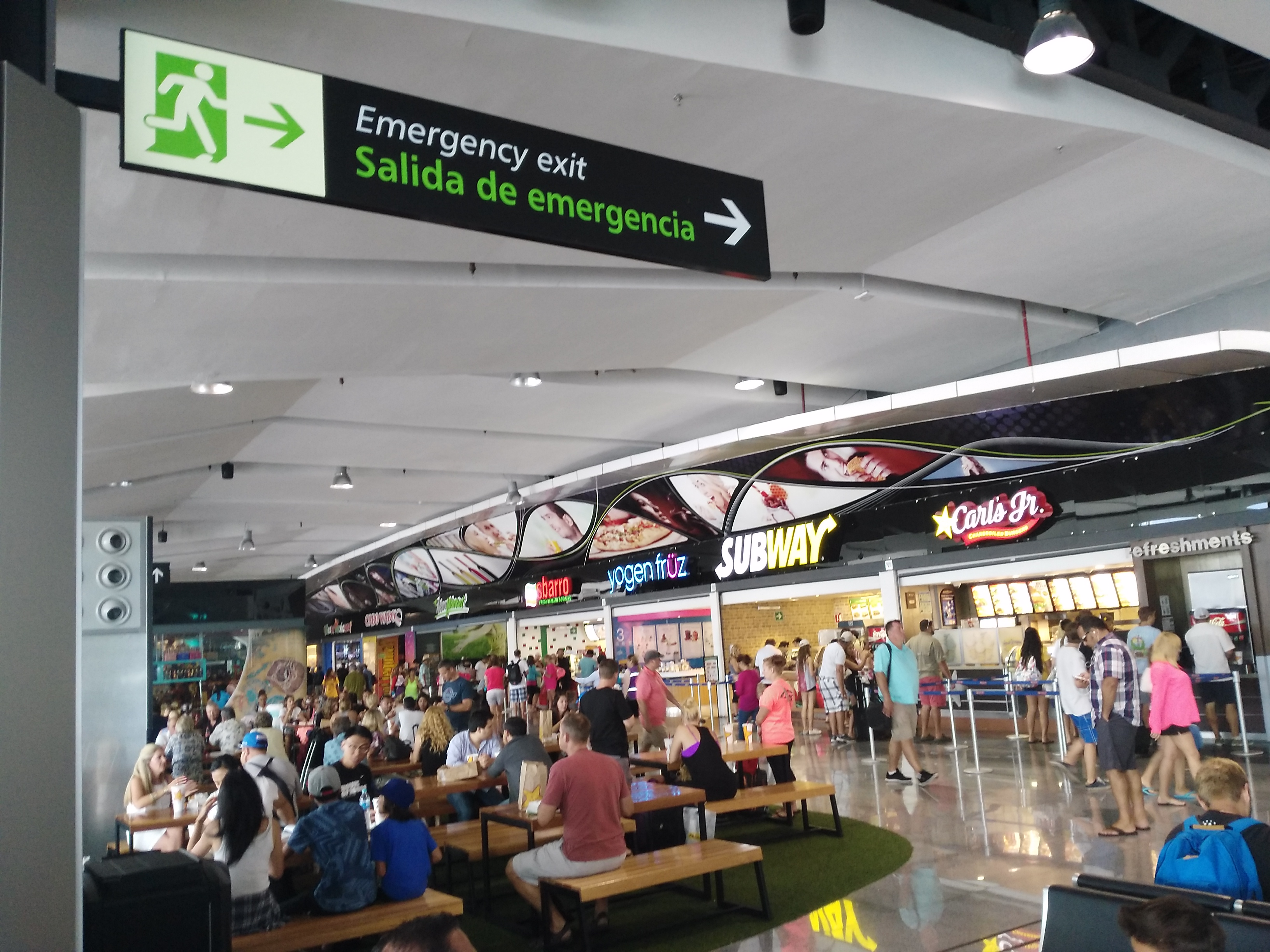 Aeropuerto de Los Cabos